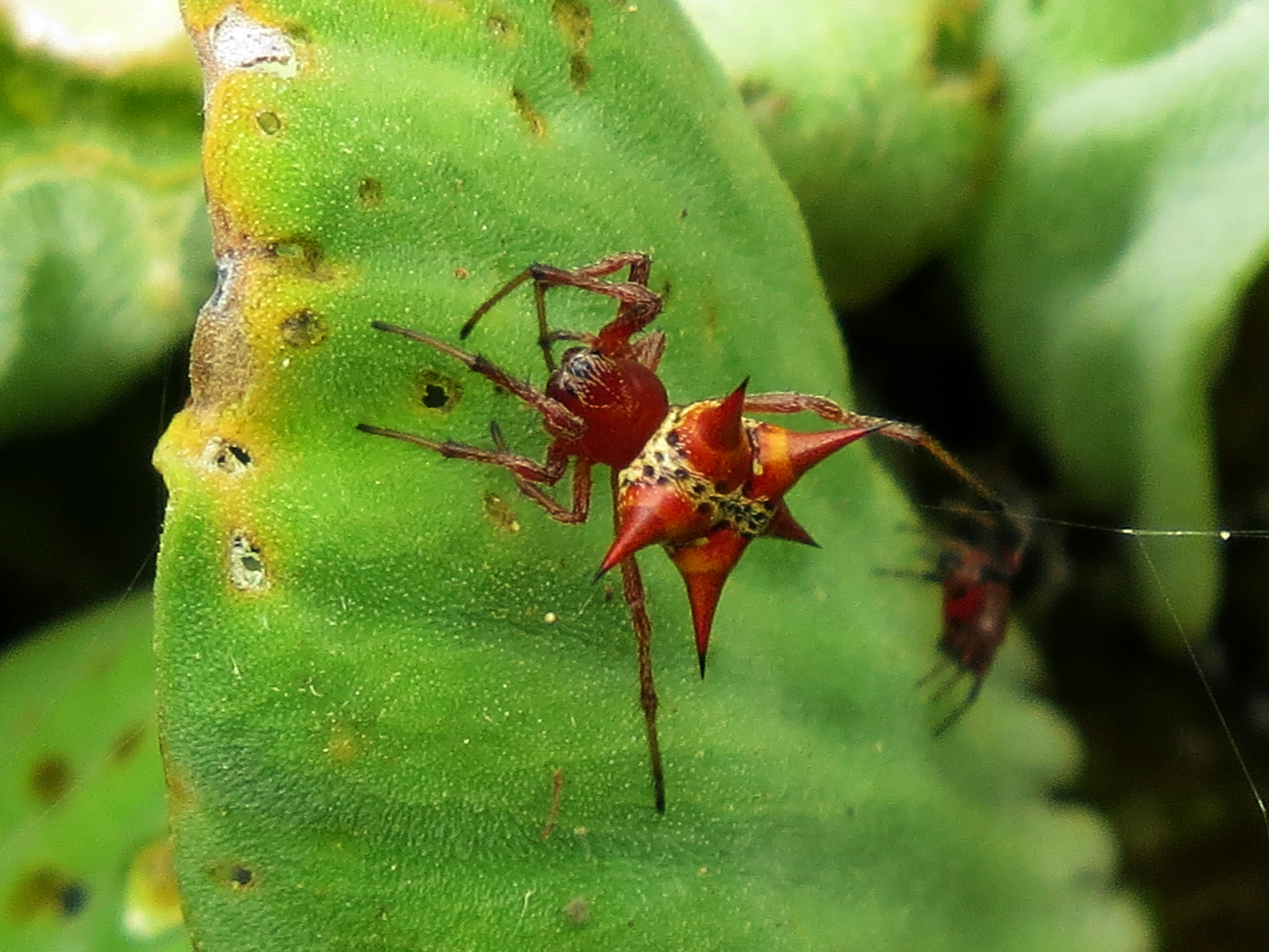 Hola, es una toma de Actinosoma pentacanthum y quería agregarla a la ficha